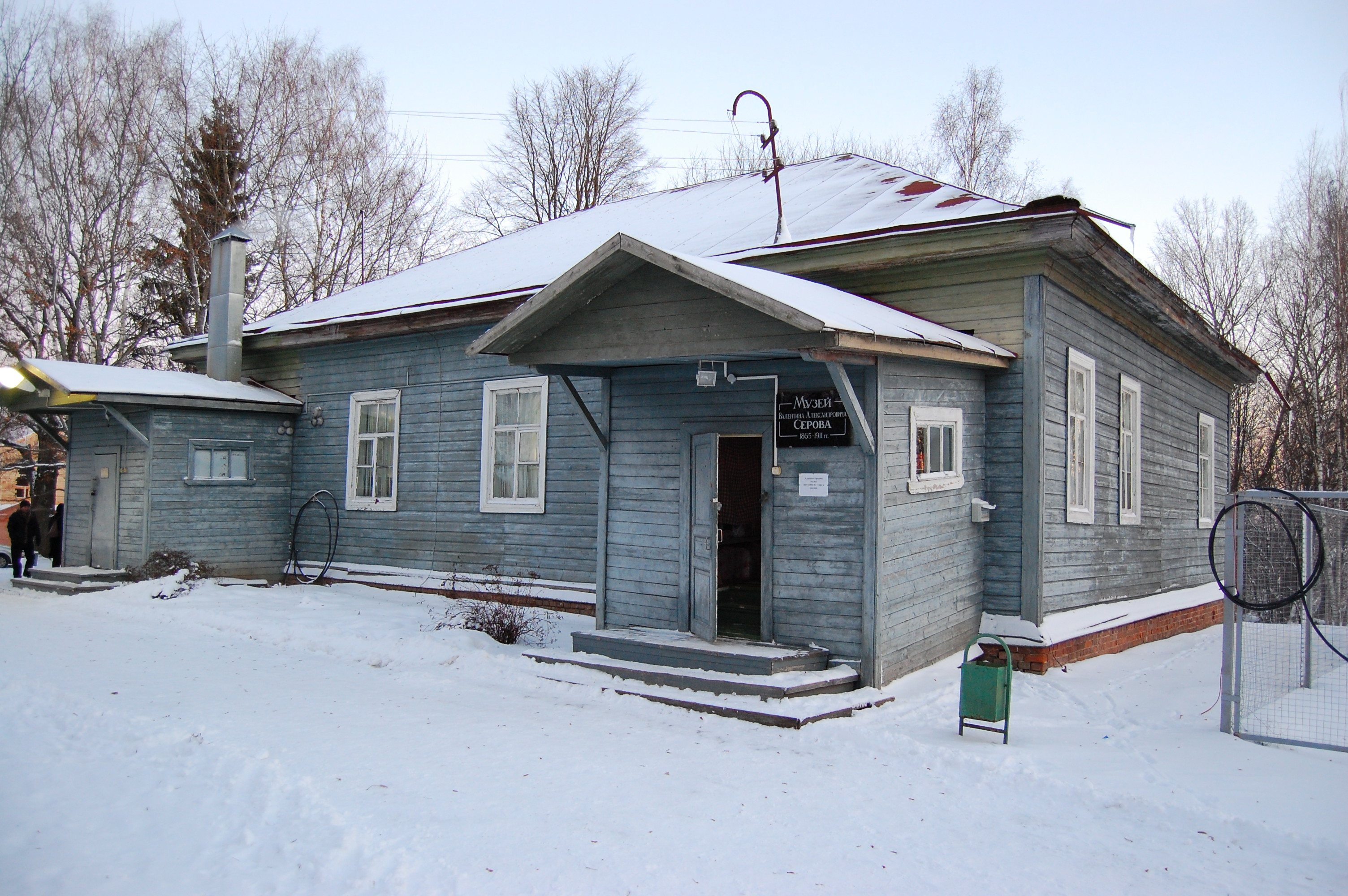 Музей В.А. Серова в селе Красная Новь (быв. Домотканово); музей располагается в одном из домов усадьбы "Домотканово"